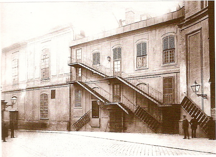 Die Rückseite (?) des alten Burgtheaters in Wien am Michaelerplatz / old Burgtheater at the Michaelerplatz in Vienna